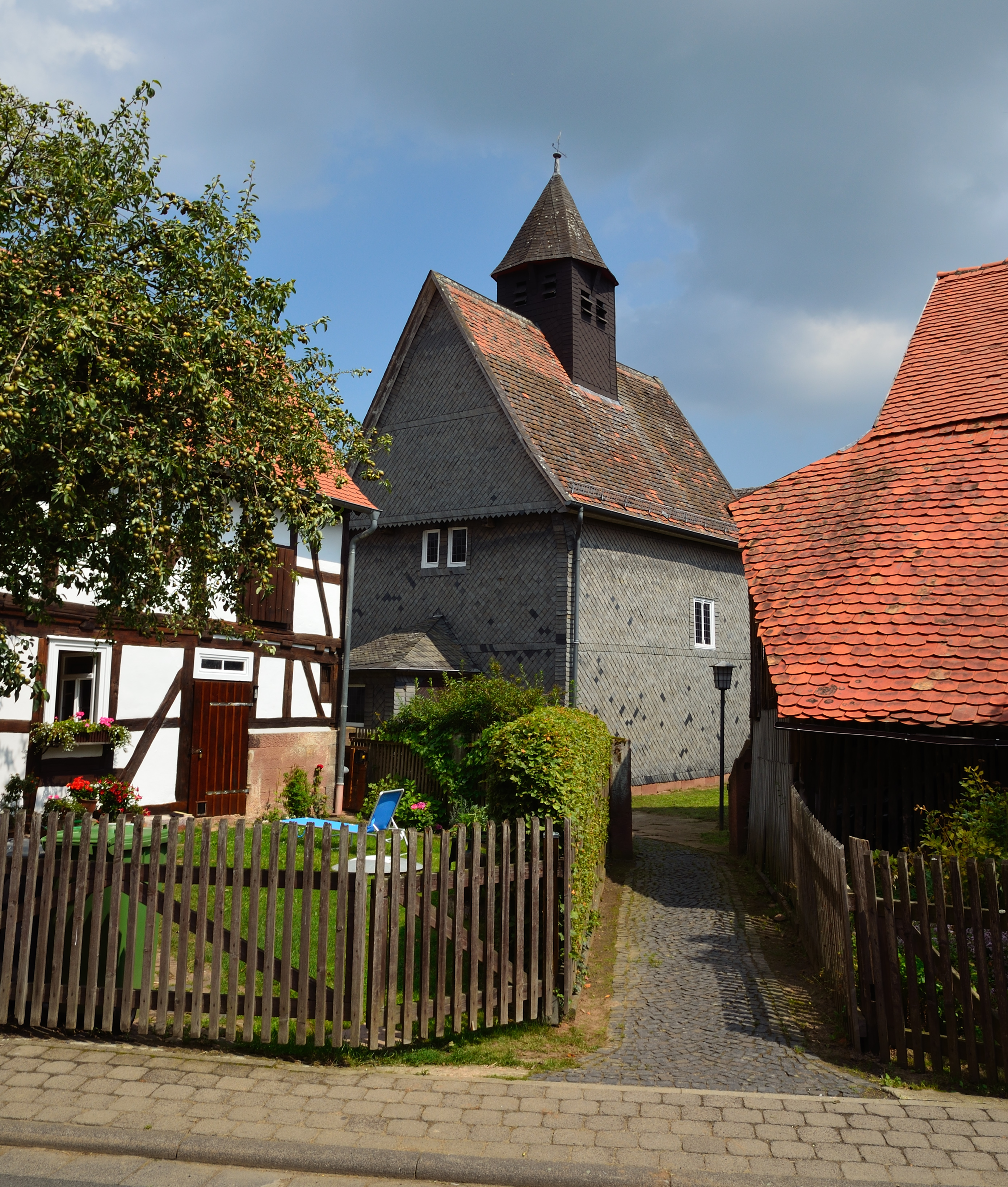 Die Kirche in Schönbach (Kirchhain)